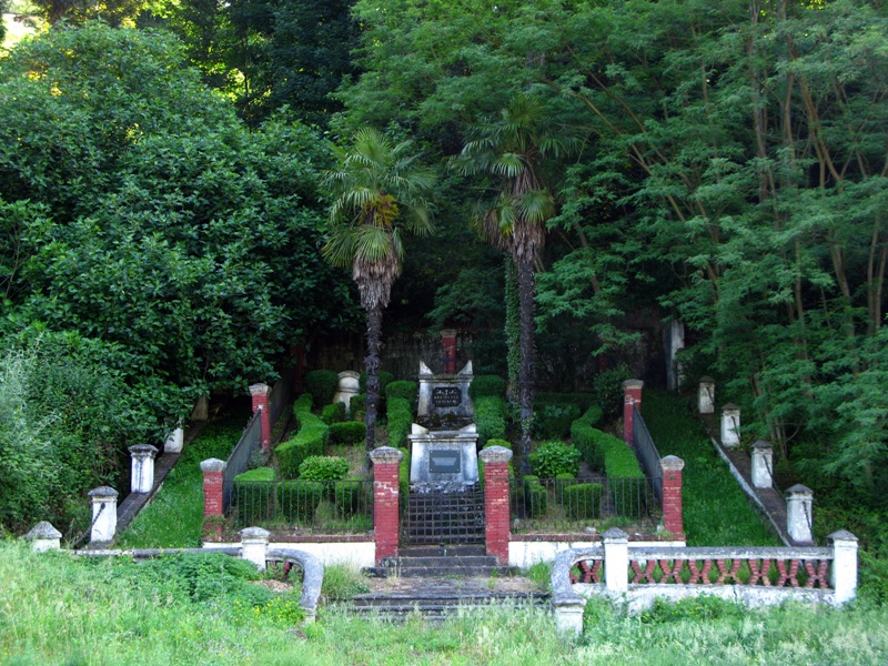 Tumba de Numa Gilhou, uno de los impulsores de la revolución industrial en Asturias a mediados del SXIX